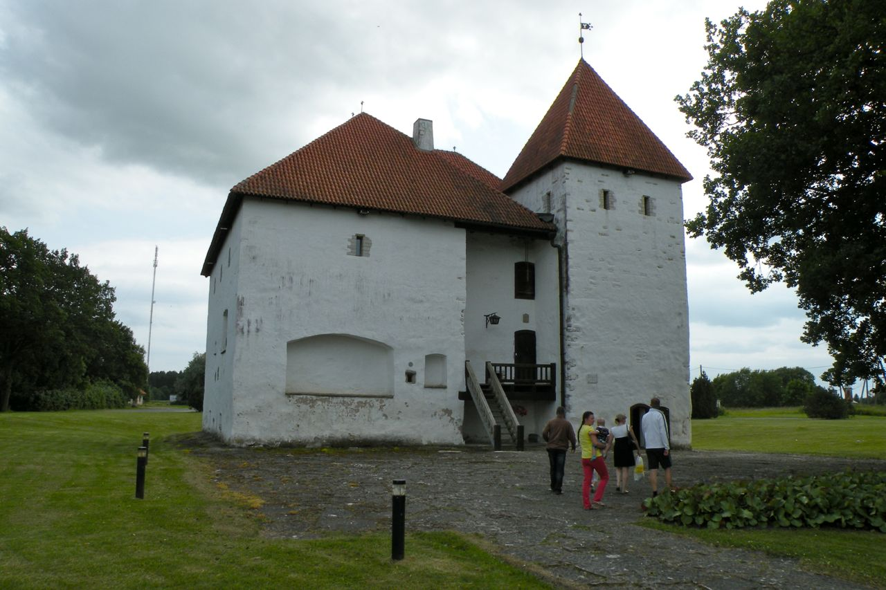 Purtse vasallilinnus